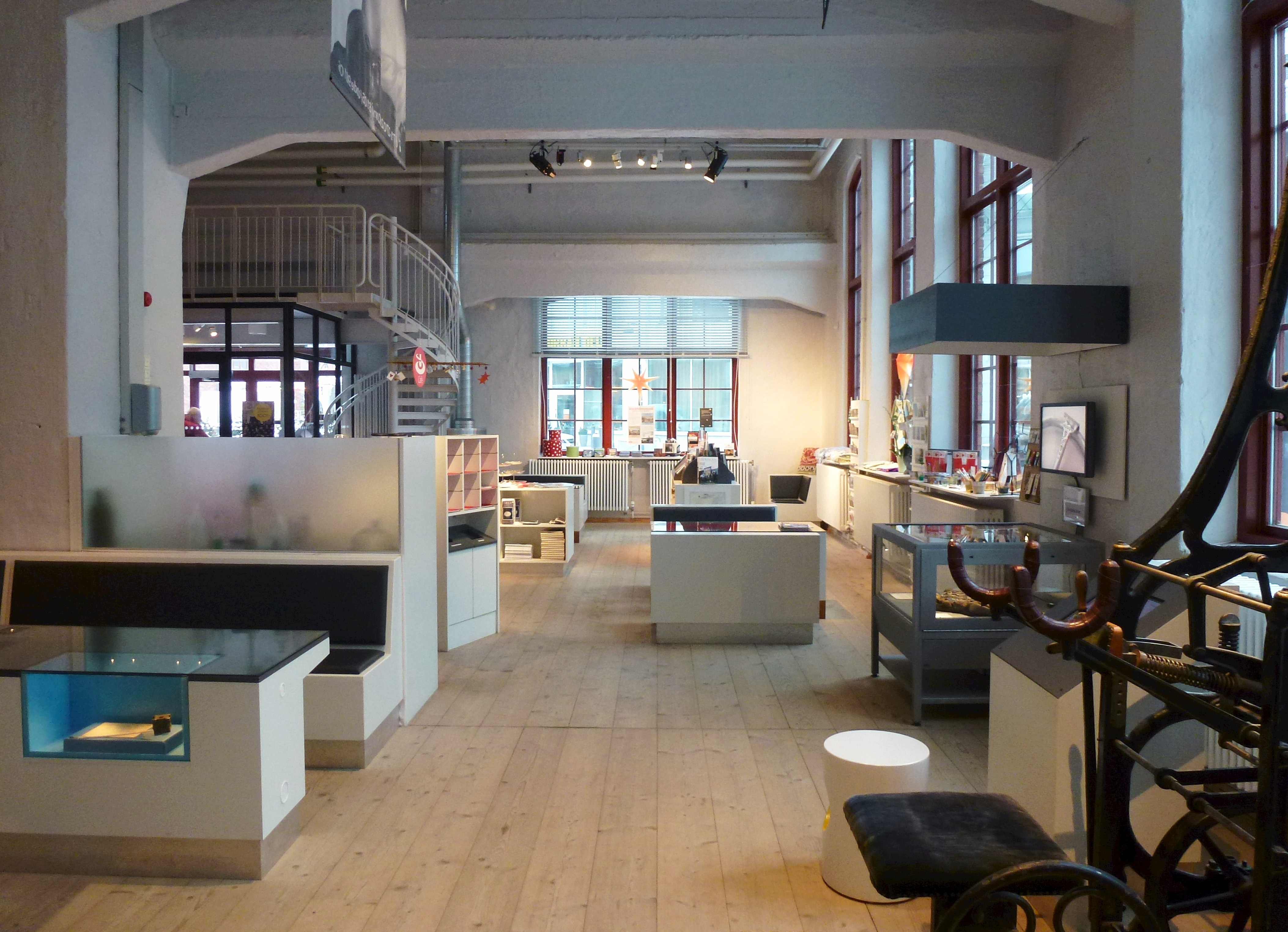 Stockholms läns museum, Dieselverkstaden